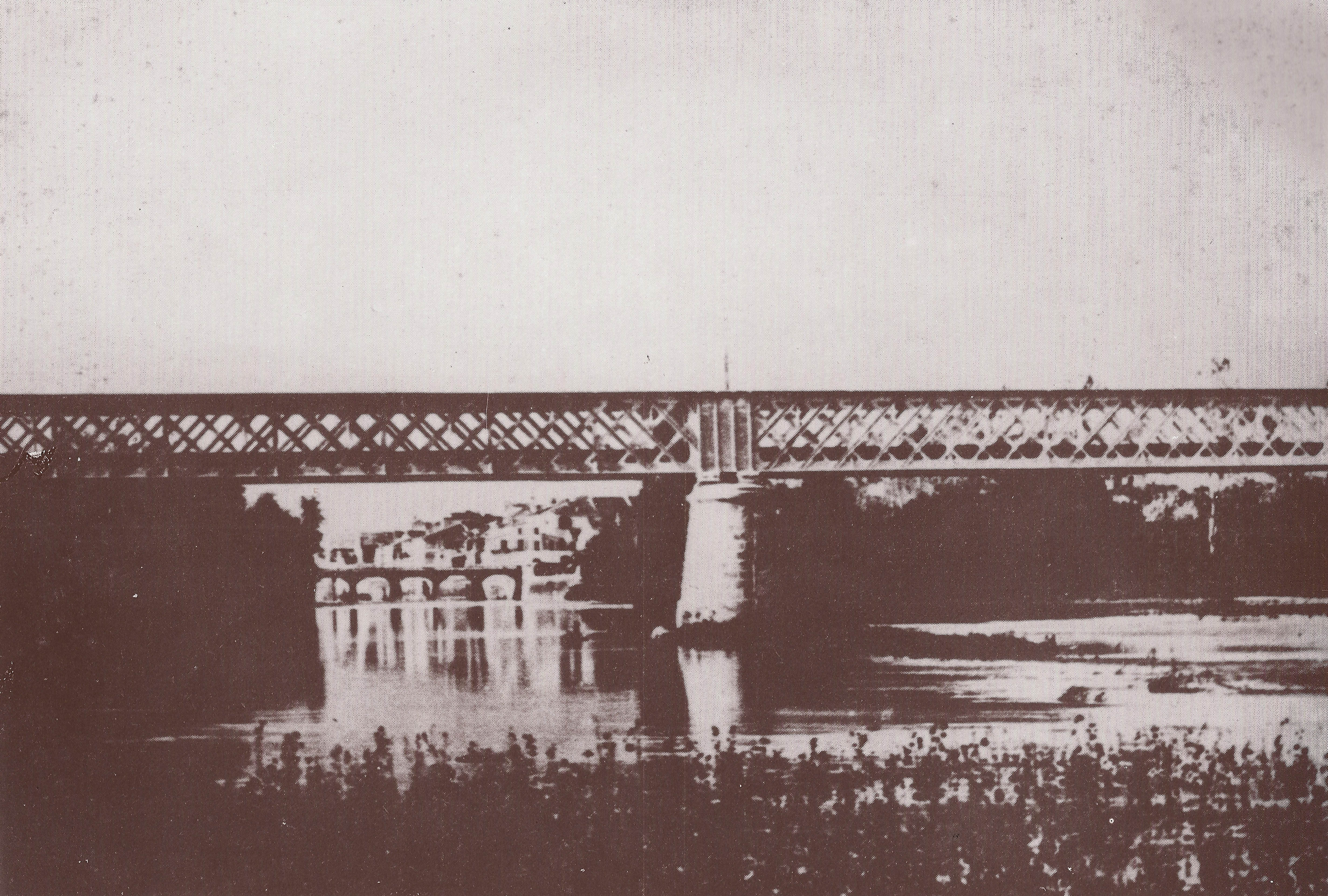 Il fiume Centa con la vista del ponte della ferrovia in primo piano e del vecchio ponte di legno sullo sfondo. Entrambi ora spariti, il primo crollato ed il secondo sostituito.